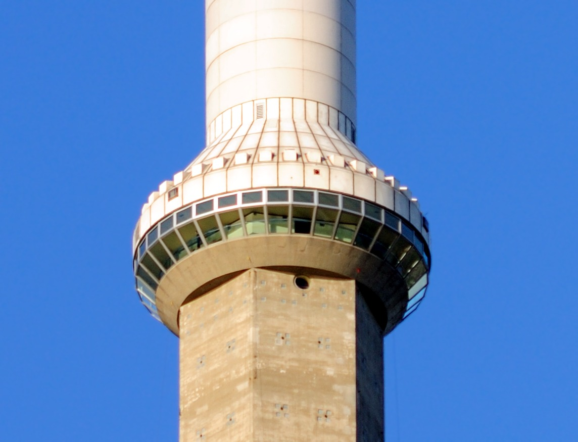 Toronto: Skypod des CN Tower (die obere Aussichtskanzel auf 447 Meter Höhe)